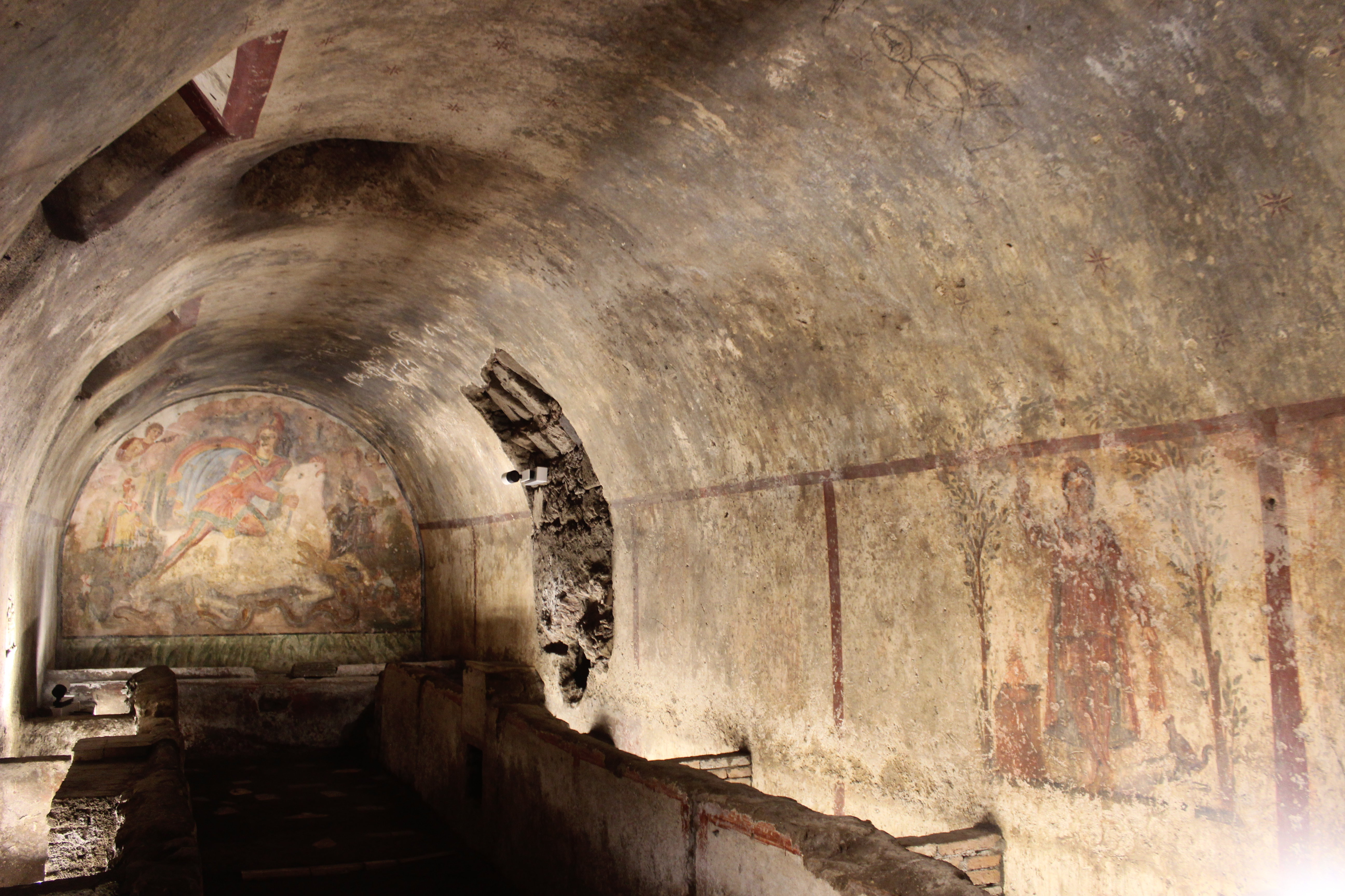 Mitreo de Capua. Interior.